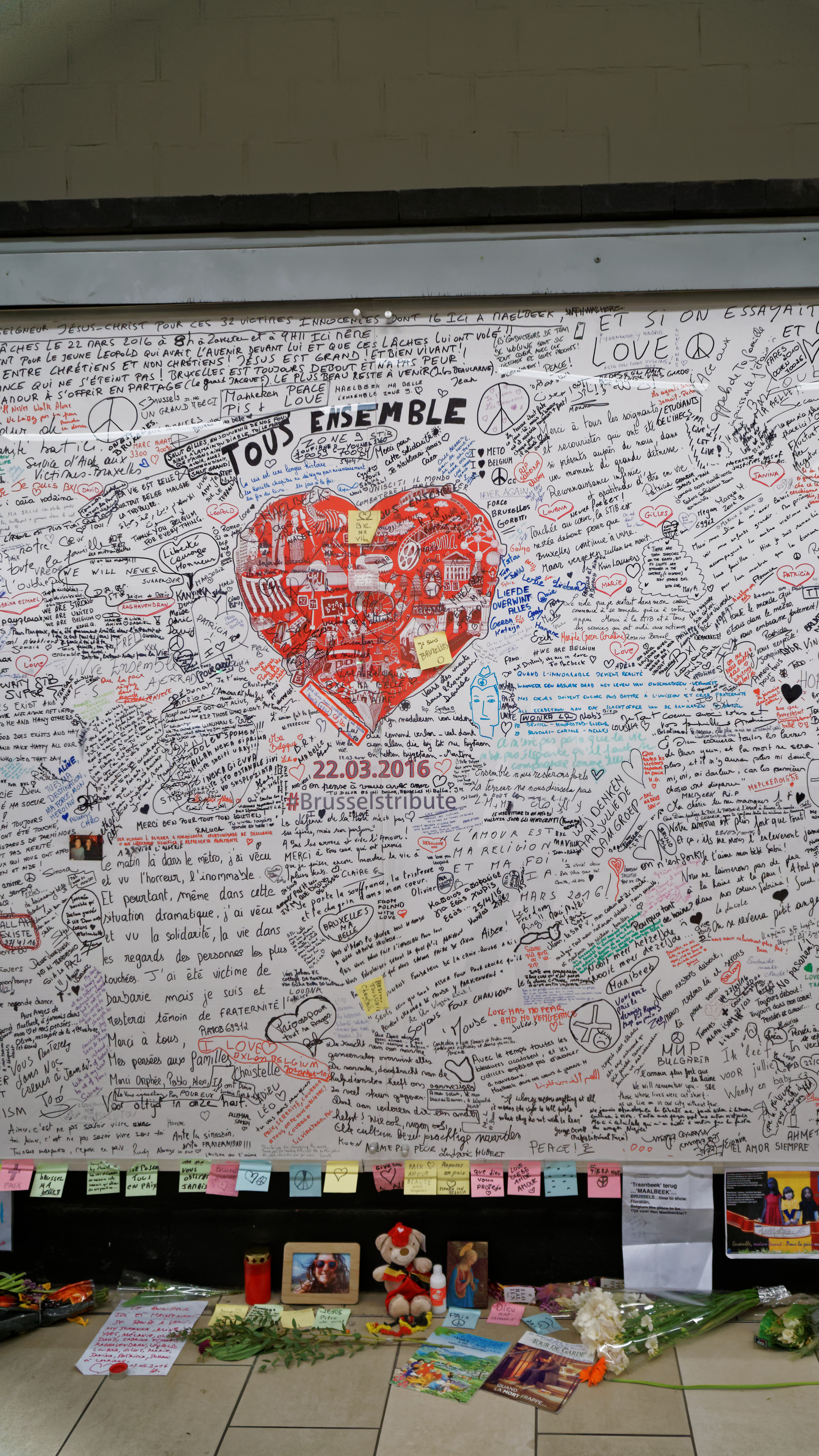 Rassemblement de personnes apres les attentats de Bruxelles.